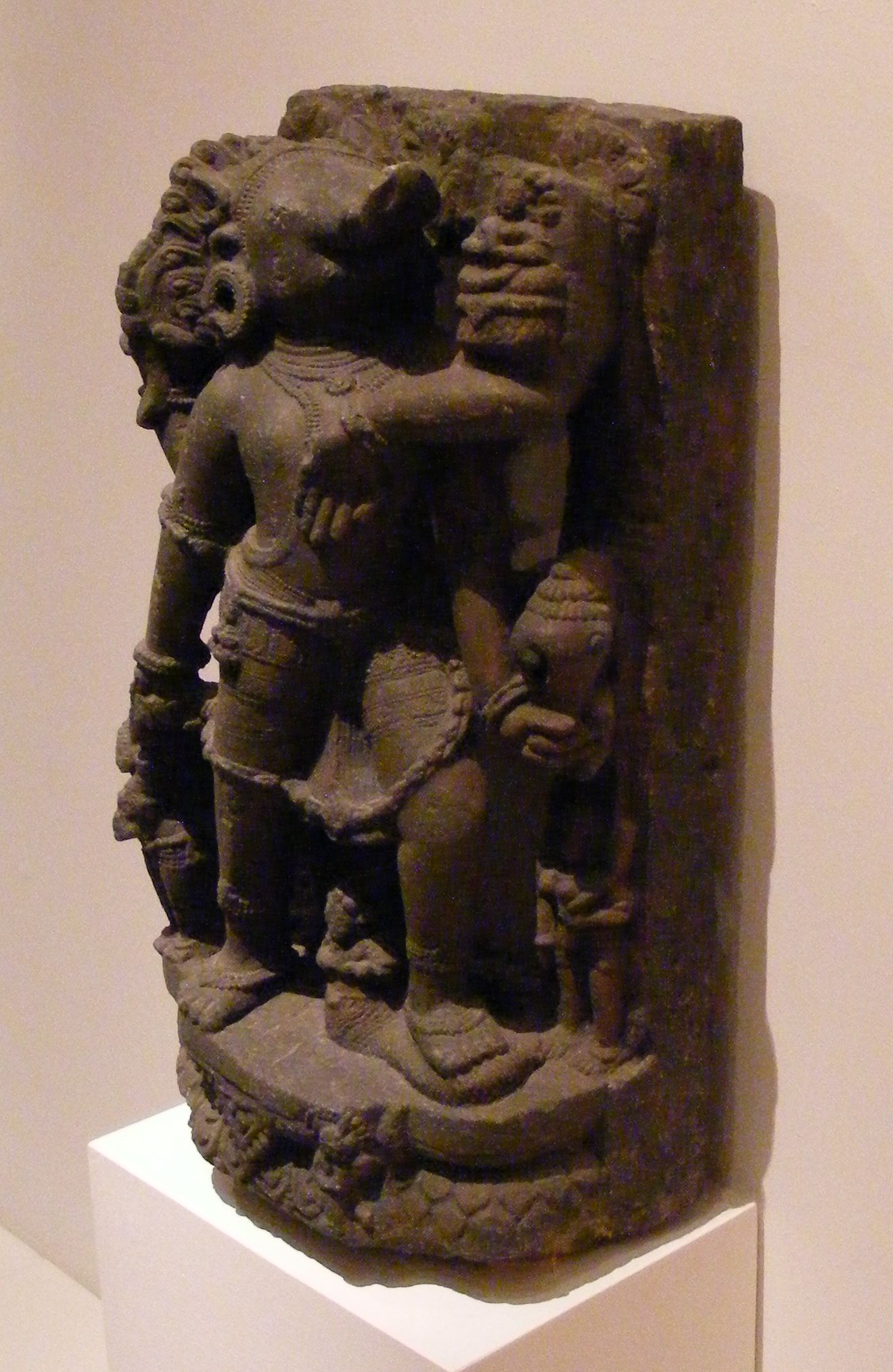 Varaha, Orissa, 13. Jahrhundert, Basaltstein, Exponat der Dauerausstellung “Indien” des Staatlichen Museums für Völkerkunde München